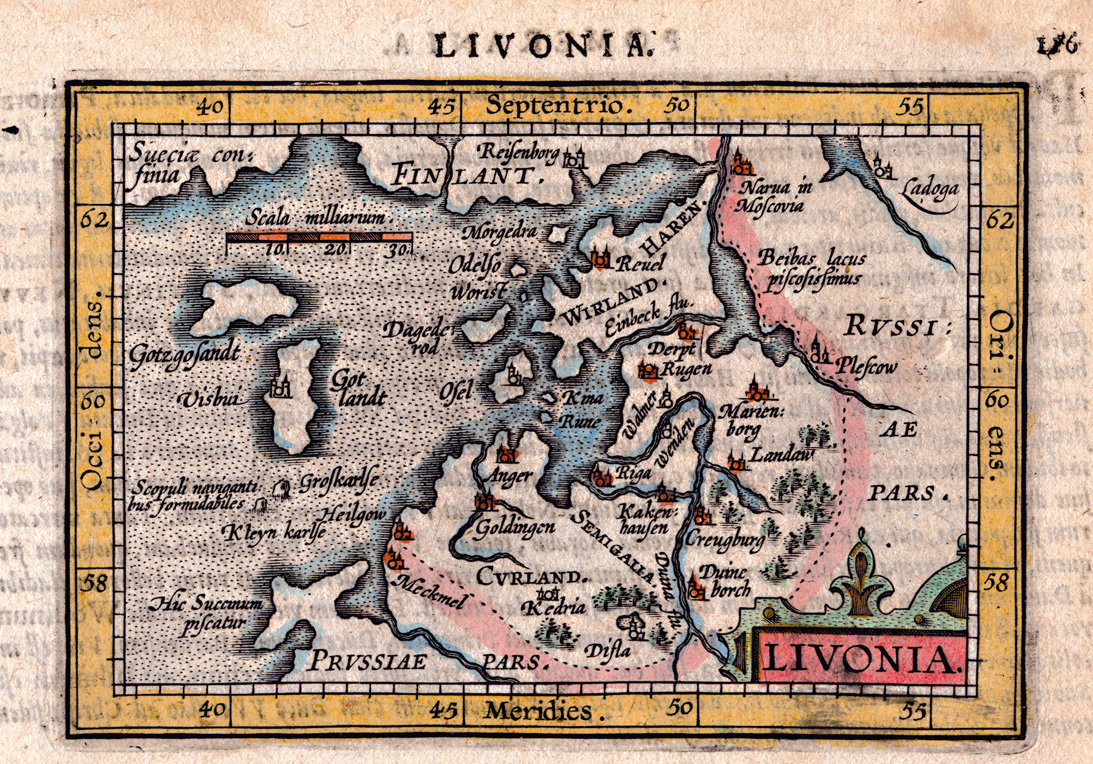 Livonia. Copper engraving, ca 1:9 700 000, 8 x 11 cm.